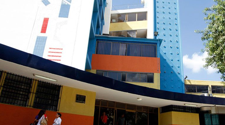 Vista del Hospital Dr. Leopoldo Manrique Terrero - Periférico de Coche